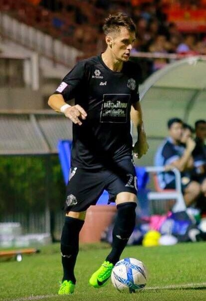 Foto 05